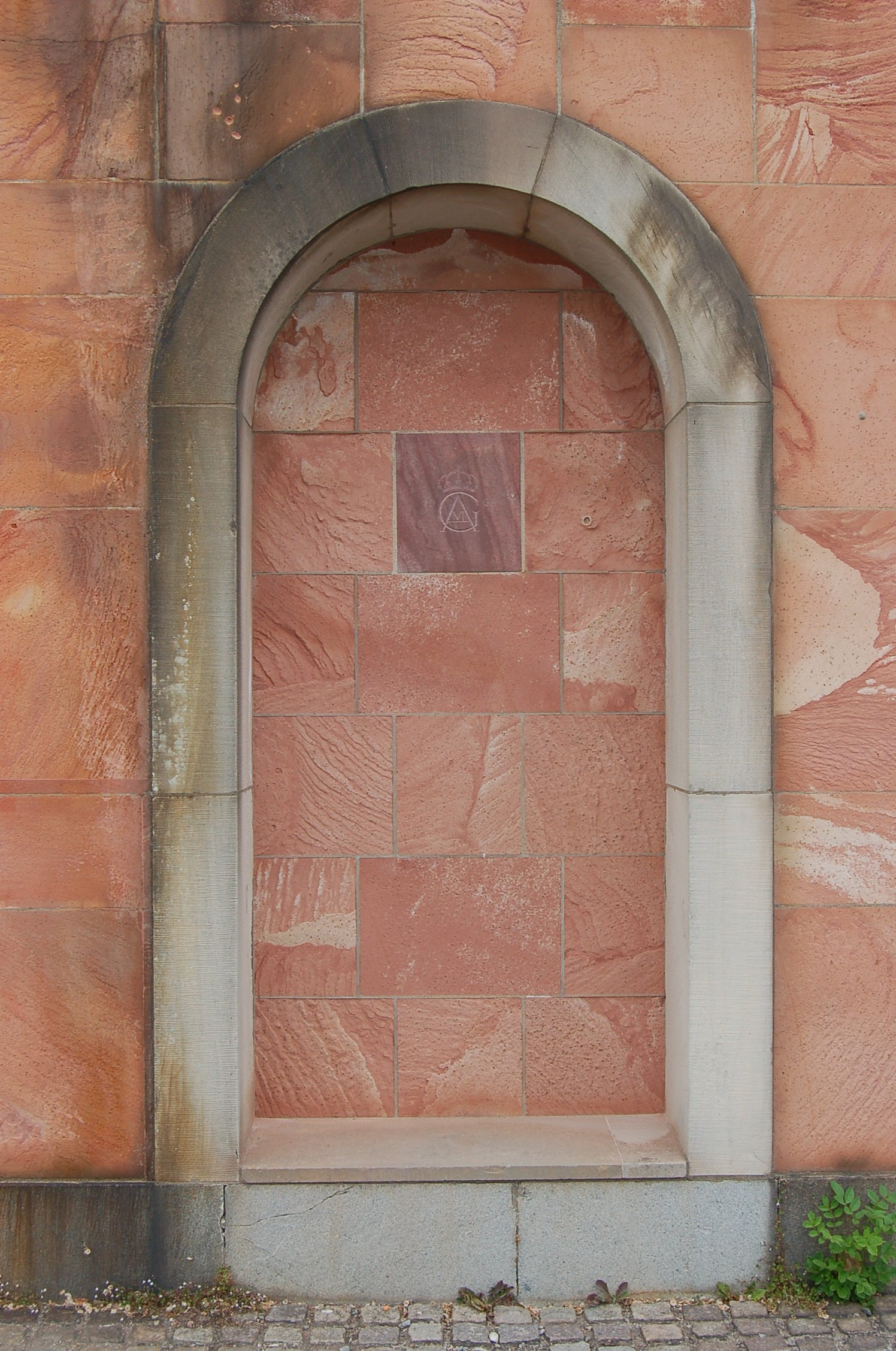 Detalj av sjösidans fasad av Tullgarns slott.